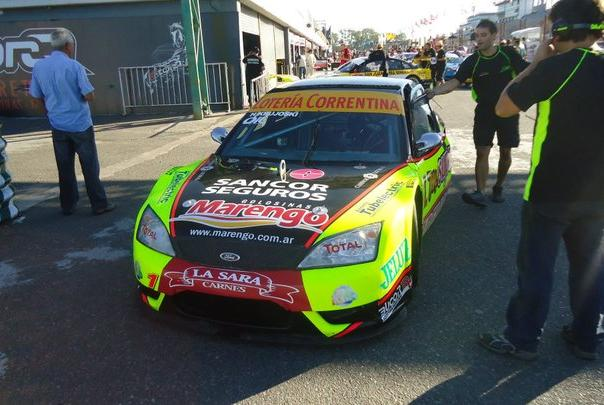 Fotografía del Ford Mondeo de Humberto Krujoski. Esta foto va en reemplazo de la que borró User:Túrelio.